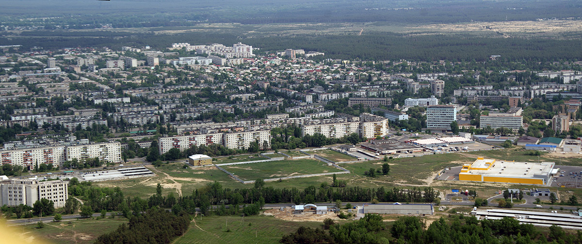 Северодонецк с высоты